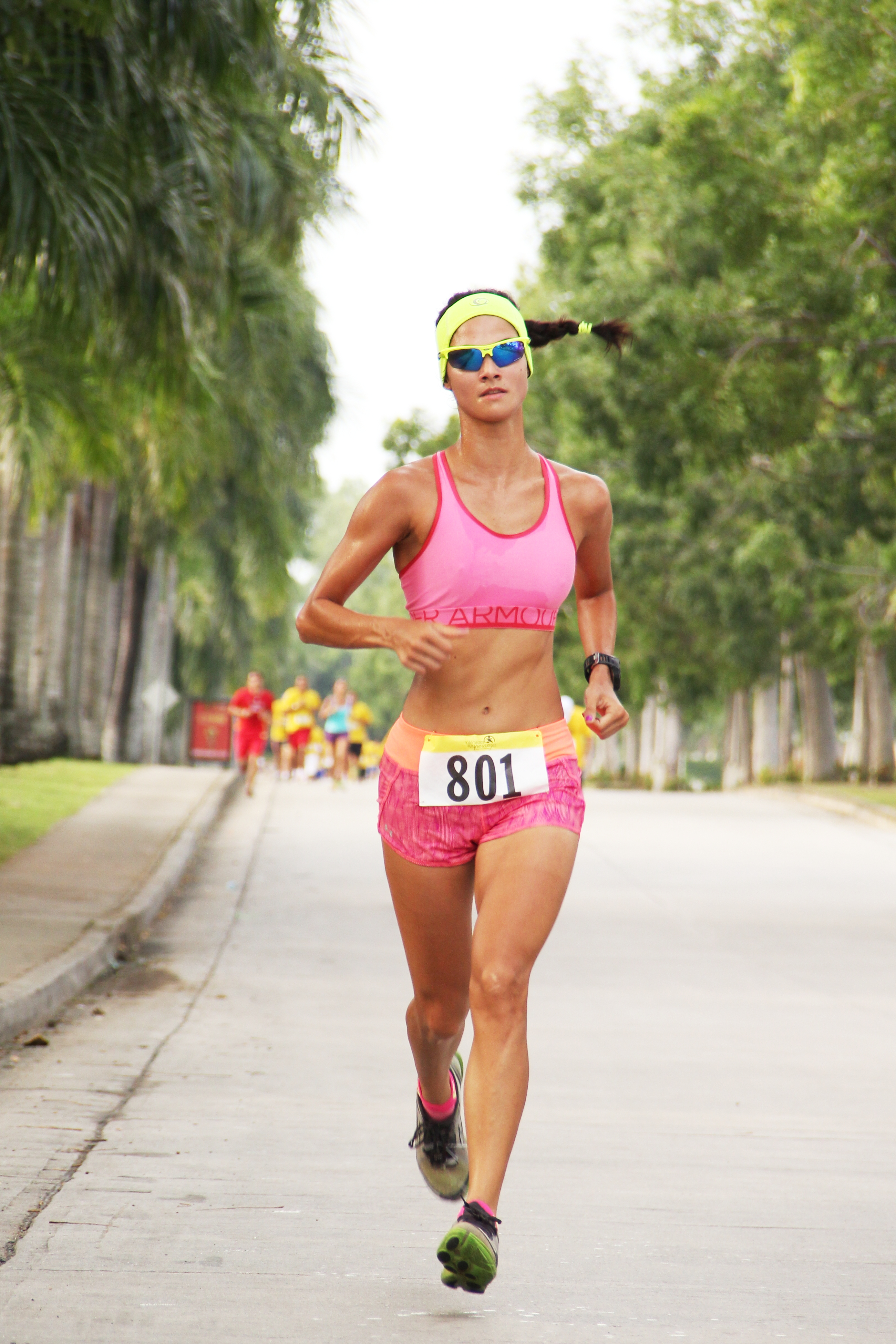 Carolina Dementiev en una carrera a beneficio de la Fundación Casa Esperanza en Costa del Este, Panamá. 25 de agosto de 2013.